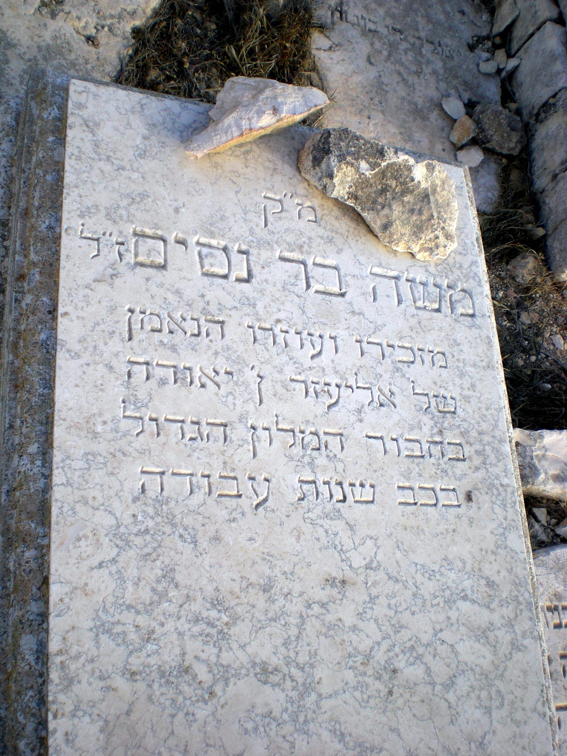 קבר משה בר-נסים בן יעקב חי המכונה בכור נסים. צילם: ערן עזריאלי